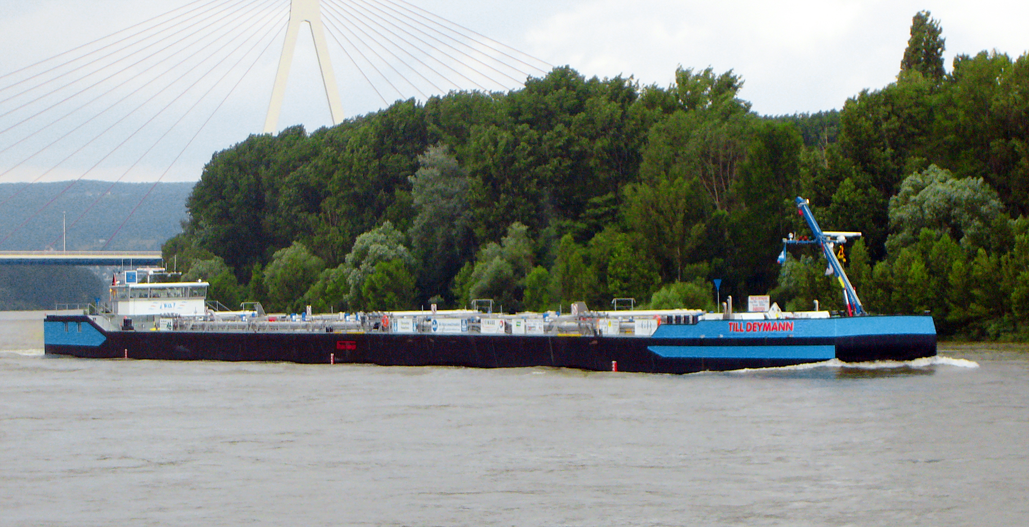 Binnentanker TILL DEYMANN Scheepsgegevens: lengte: 109,80 meter breedte: 11,45 meter diepgang: 3,75 inhoud ladingtanks: 3.375 m3 voortstuwing: 4 HPR roerpropellers. ENI nummer 04805920